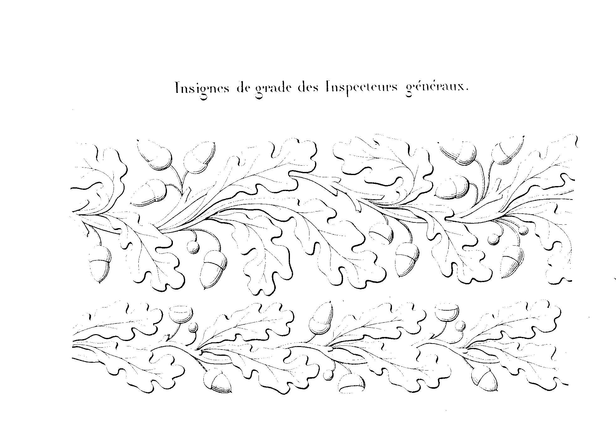 Broderies de grade des officiers généraux (inspecteurs généraux, administrateurs, directeur) de l'Administration des Forêts, 1878, reprise par l'arrêté de 1891.